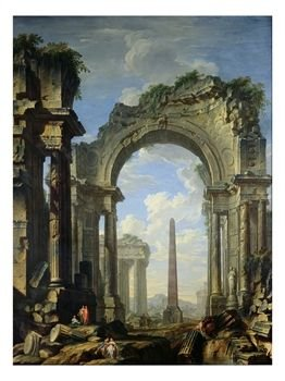 Architecture avec ruines d'un temple ionique et obélisque. Jean Jérôme Nicolas Servandoni (1695-1766). Huile sur toile, H. 259 x L. 195 cm. paris, Musée de l'École nationale supérieure des Beaux-Arts.